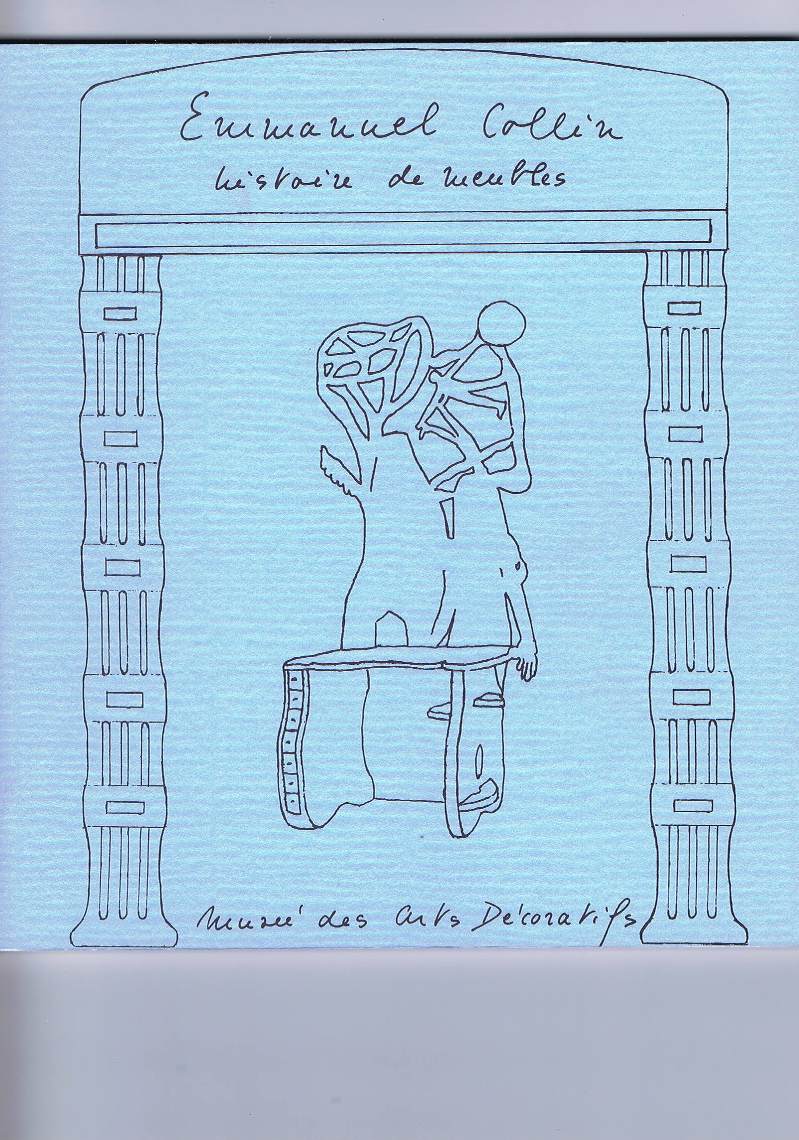 couverture du catalogue de l'exposition au Musée des Arts Décoratifs réalisée par l'artiste et le musée, le catalogue étant épuisé, a renoncé à tous droits sur ce catalogue.